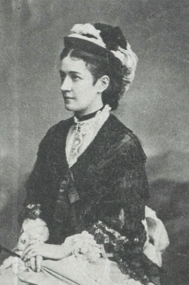 Анна Сергеевна Салтыкова, ур. Долгорукова (1848?-1917), в замужестве за Николаем Ивановичем Салтыковым (1830—1901).